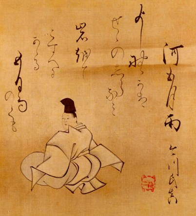 『集外三十六歌仙』に掲載されている画帖。